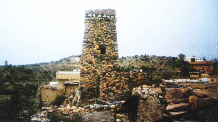 حصون بلاد قبيلة حوالة